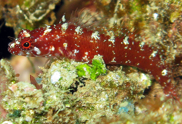 Starksia weigti